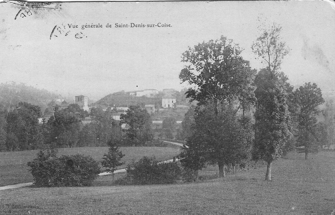 Vue générale de Saint-Denis-sur-Coise